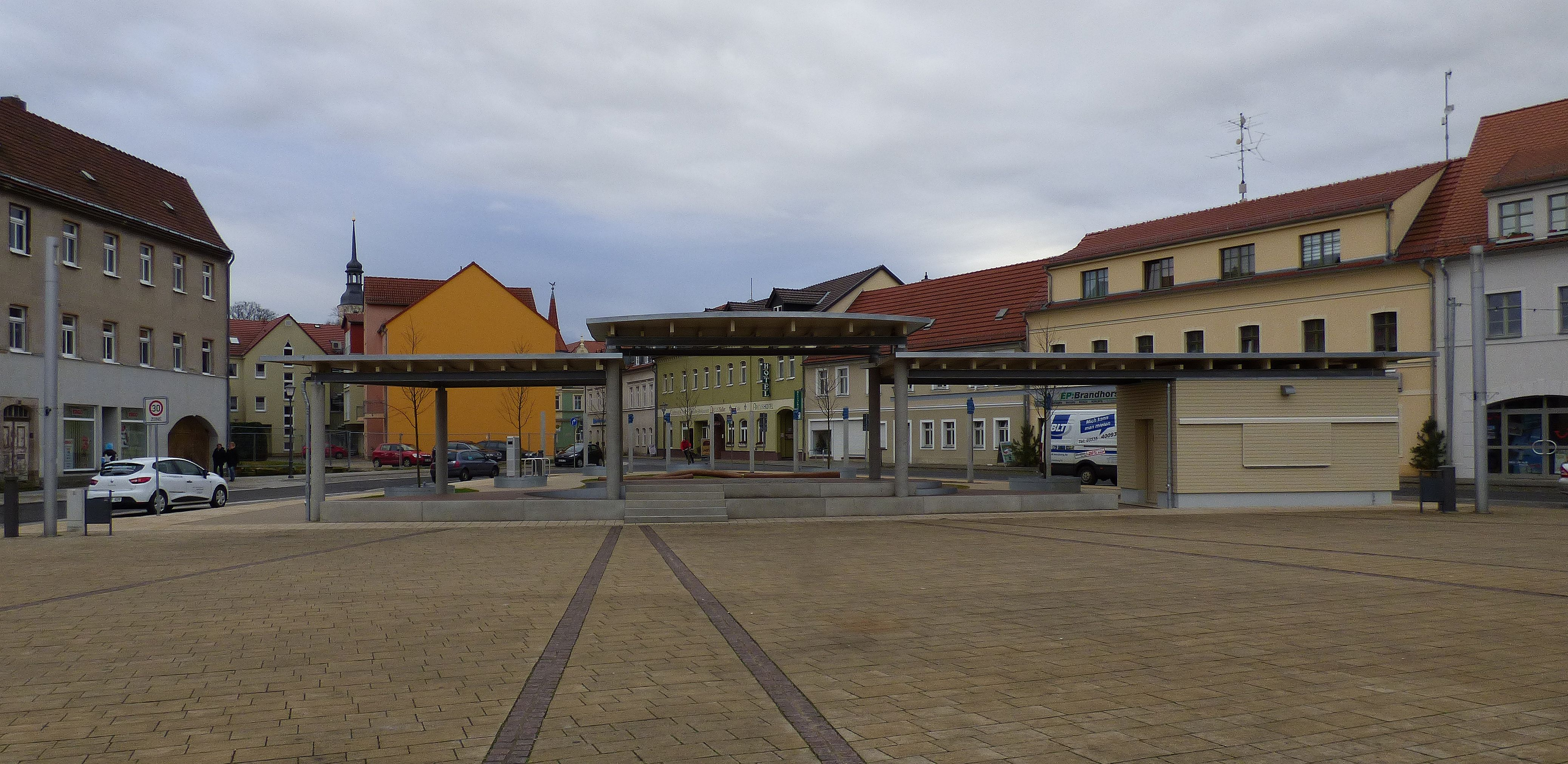 Bühne und Multifunktionsgebäude auf dem umgestalteten Markt in Elsterwerda an Weihnachten 2015.